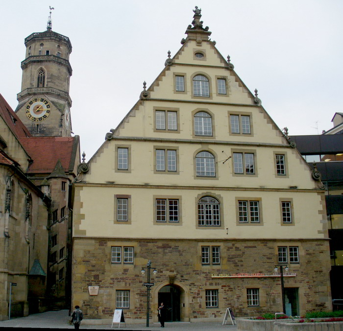 Stuttgart Fruchtkasten am Schillerplatz